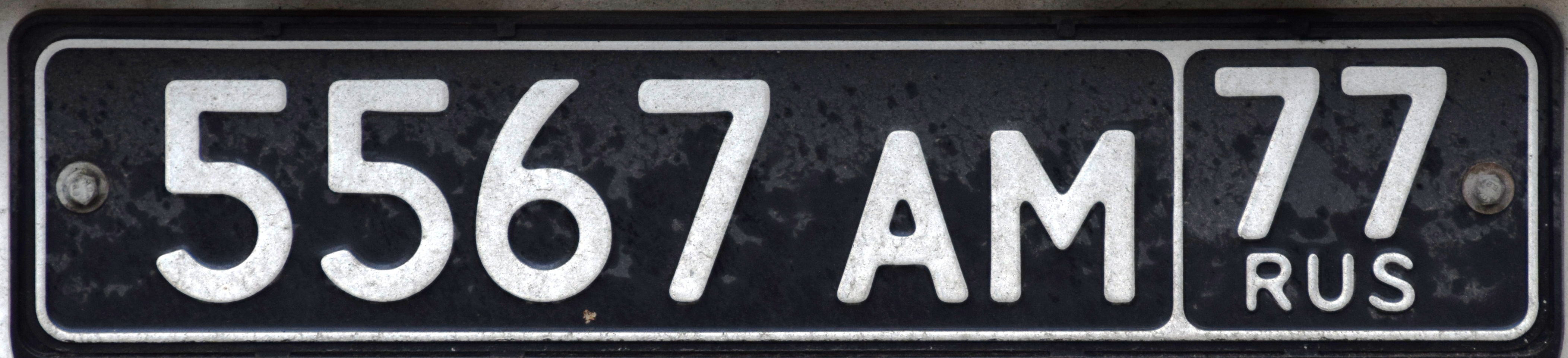 Russische kentekenplaat voor militaire voertuigen